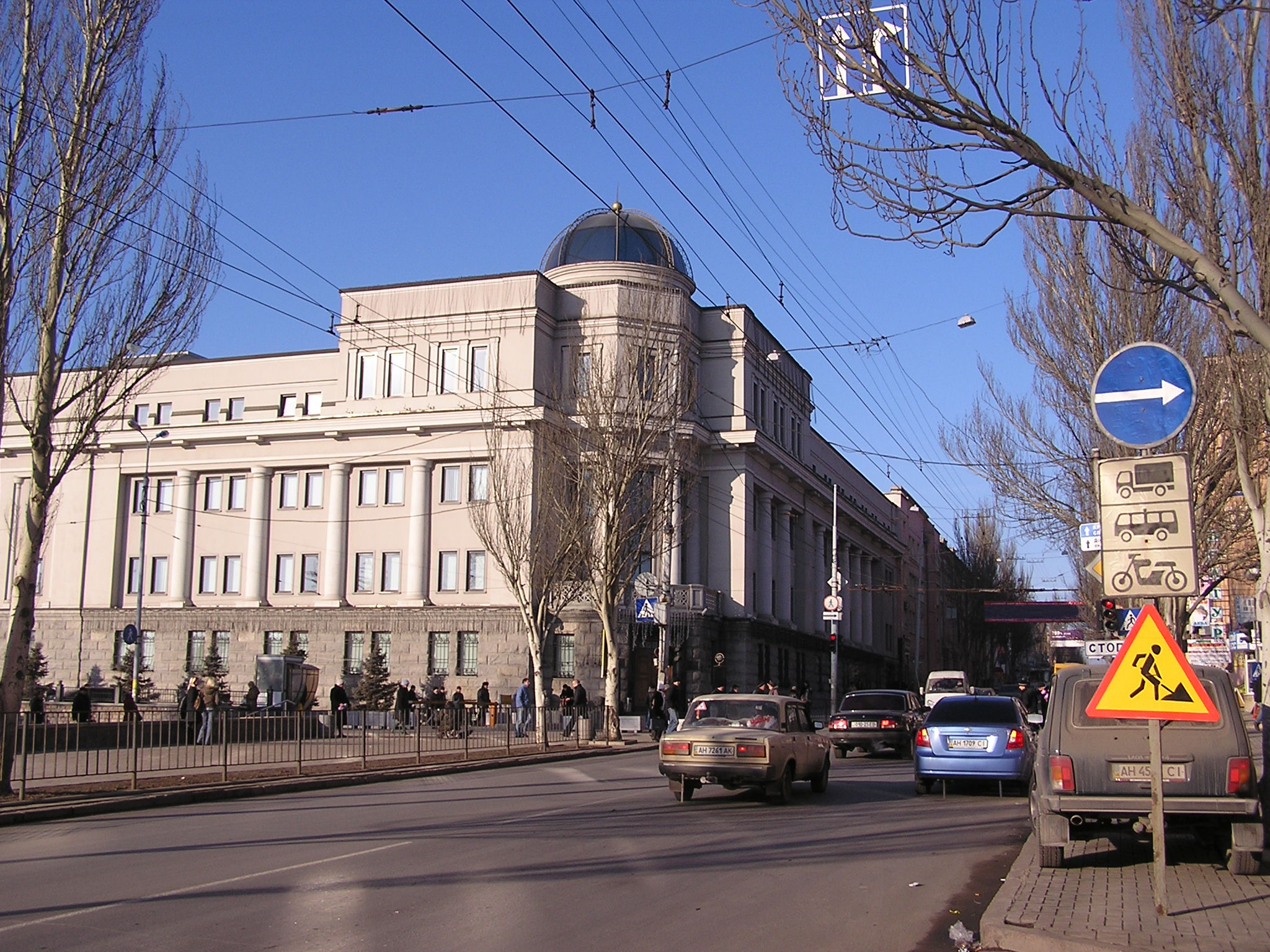 Донецк. Фасад Донгорбанка